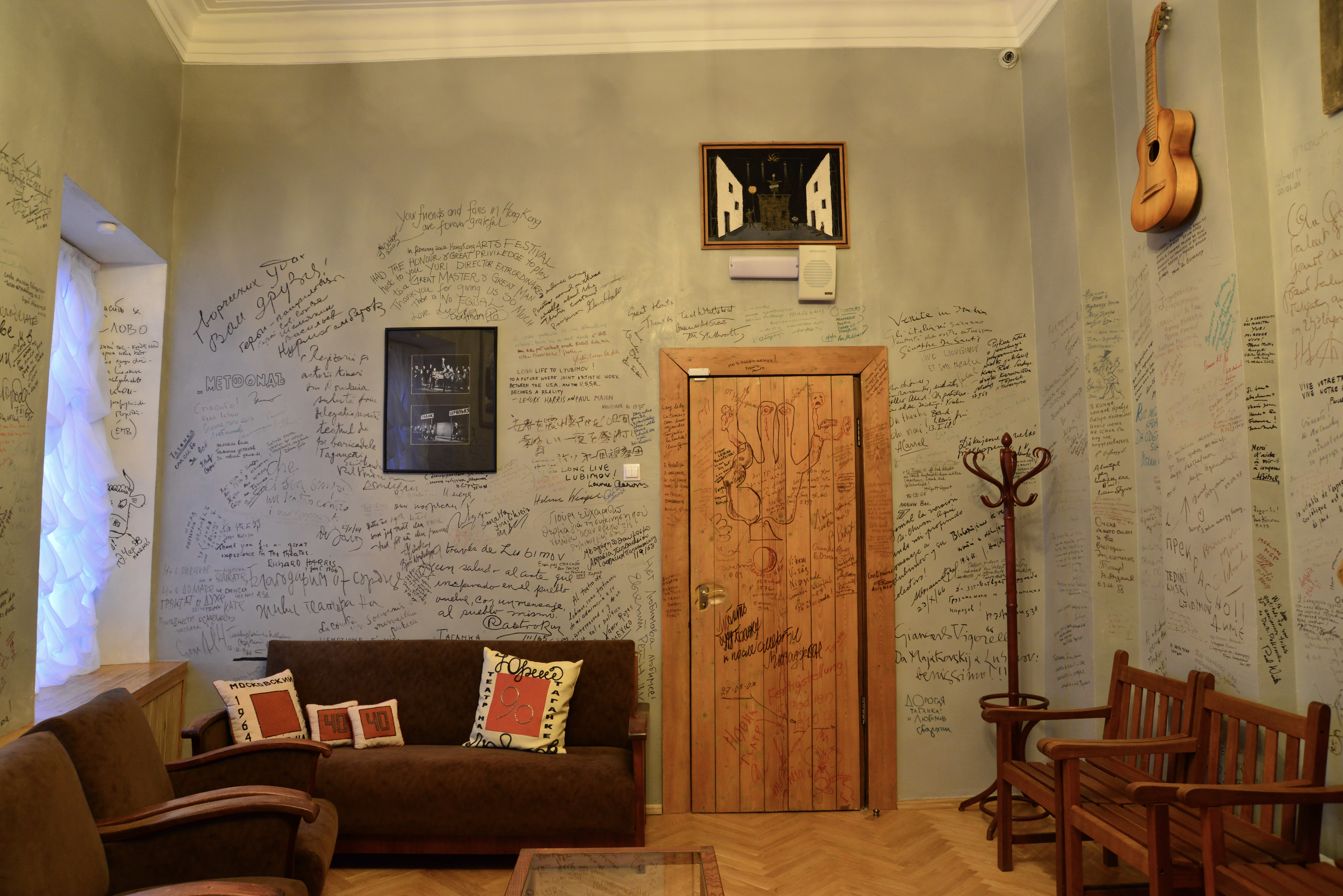 Кабинет Юрия Любимова в театре на Таганке